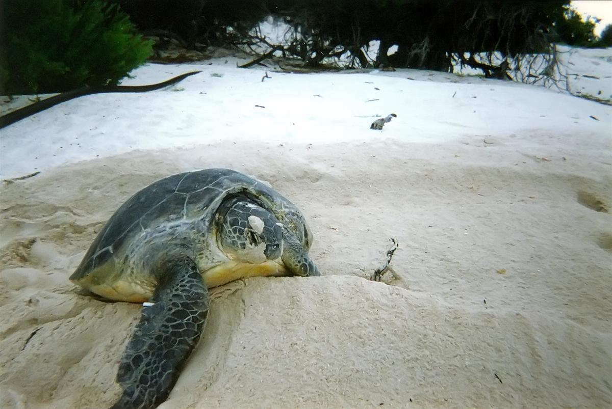 Tortue verte en train de pondre sur une plage de l'île d'Europa